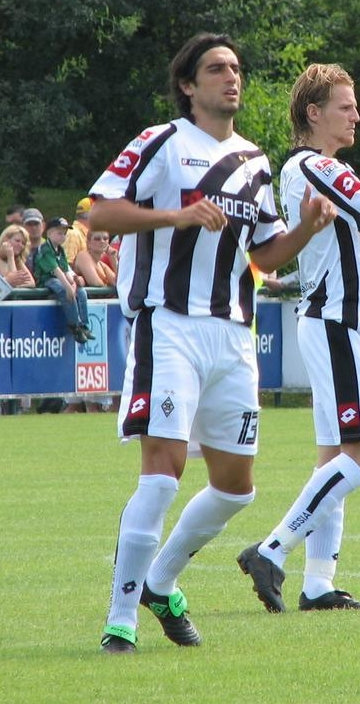 Ze Antonio